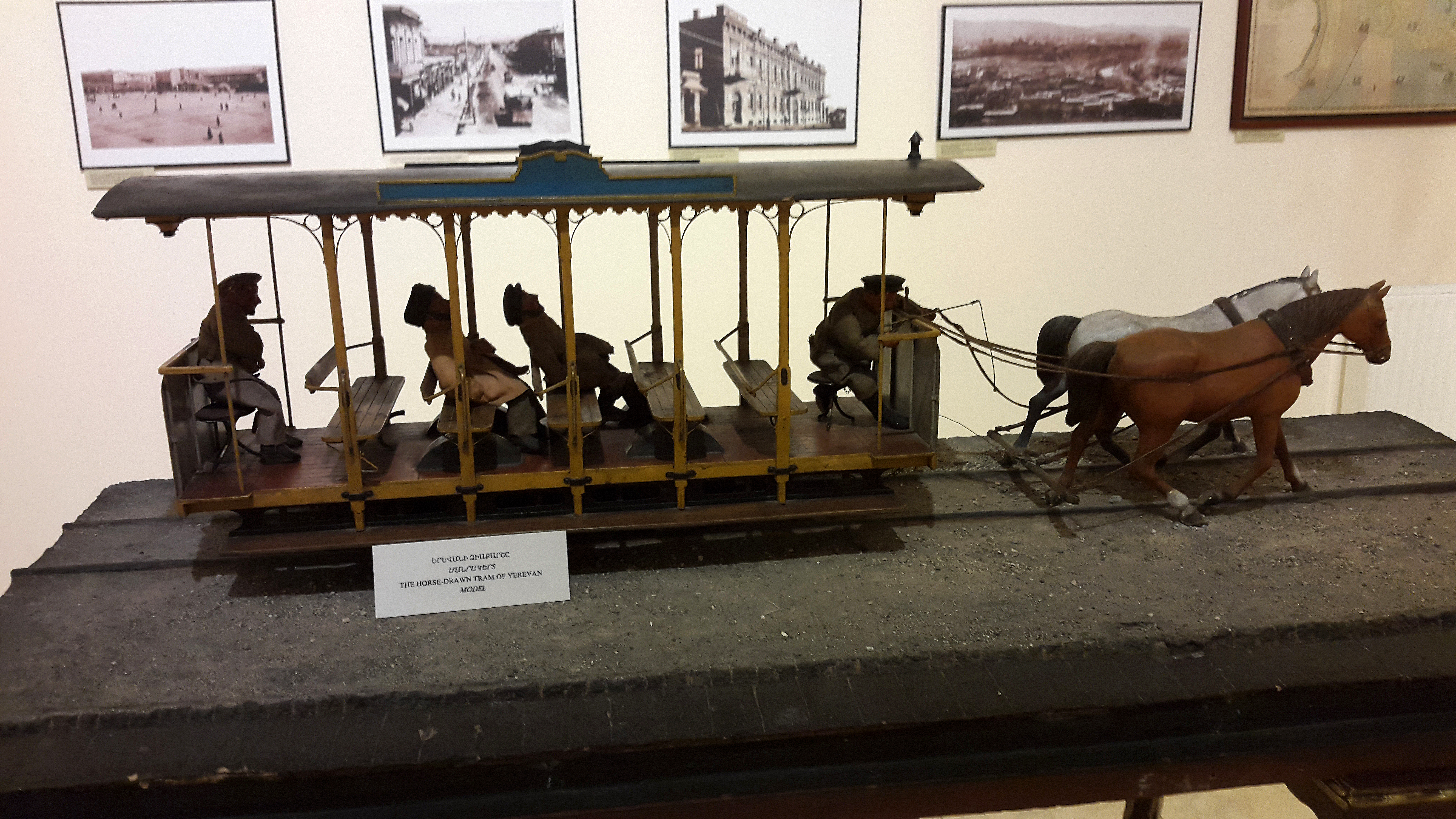 Yerevan horse-drawn cart model